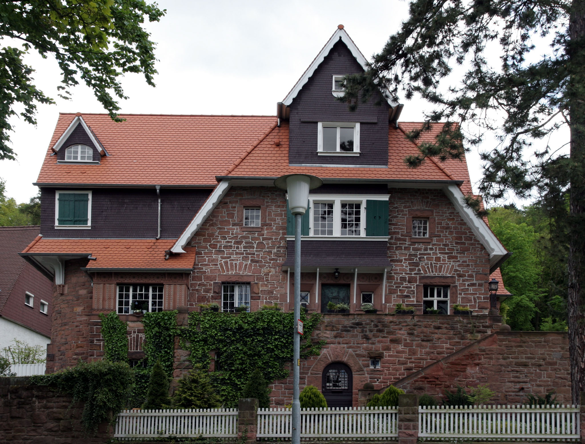 Das unter Denkmalschutz stehende Haus Nr. 25 in der Ernst-Ludwig-Straße der Stadt Bensheim